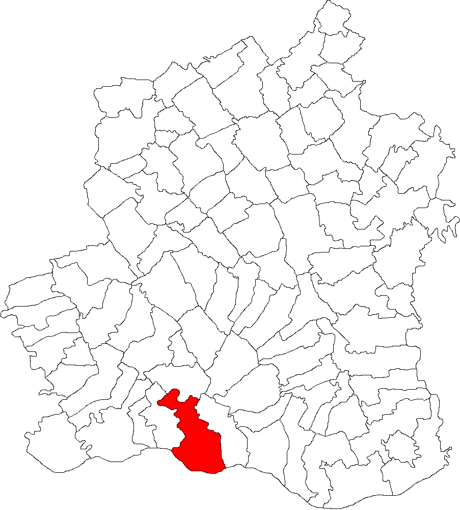 Categorie:Hărţi ale judeţului Teleorman